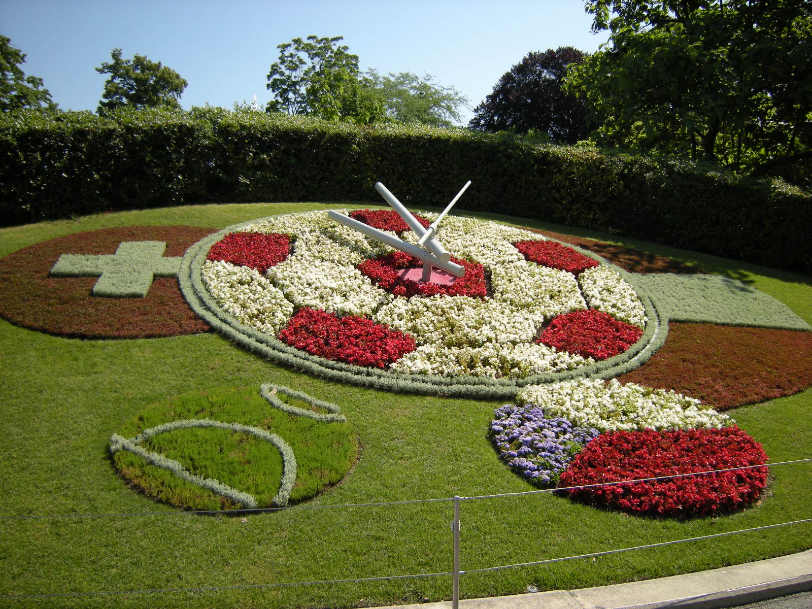 Relógio de flores símbolo da indústria de relógios genevesa. (especialmente decorado para a Eurocopa 2008)